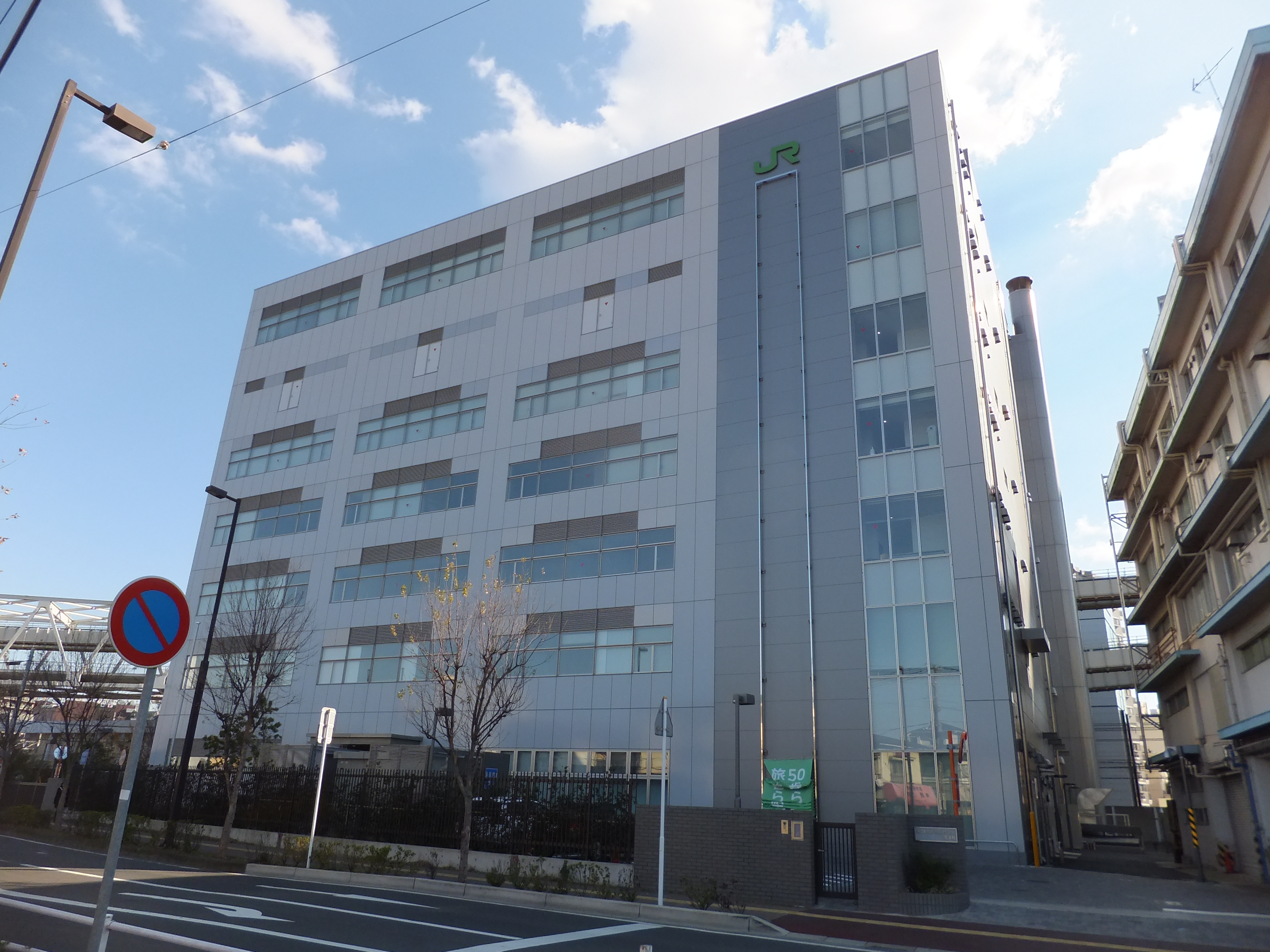 JR東日本千葉支社。2012年に新社屋を建設して移転した。